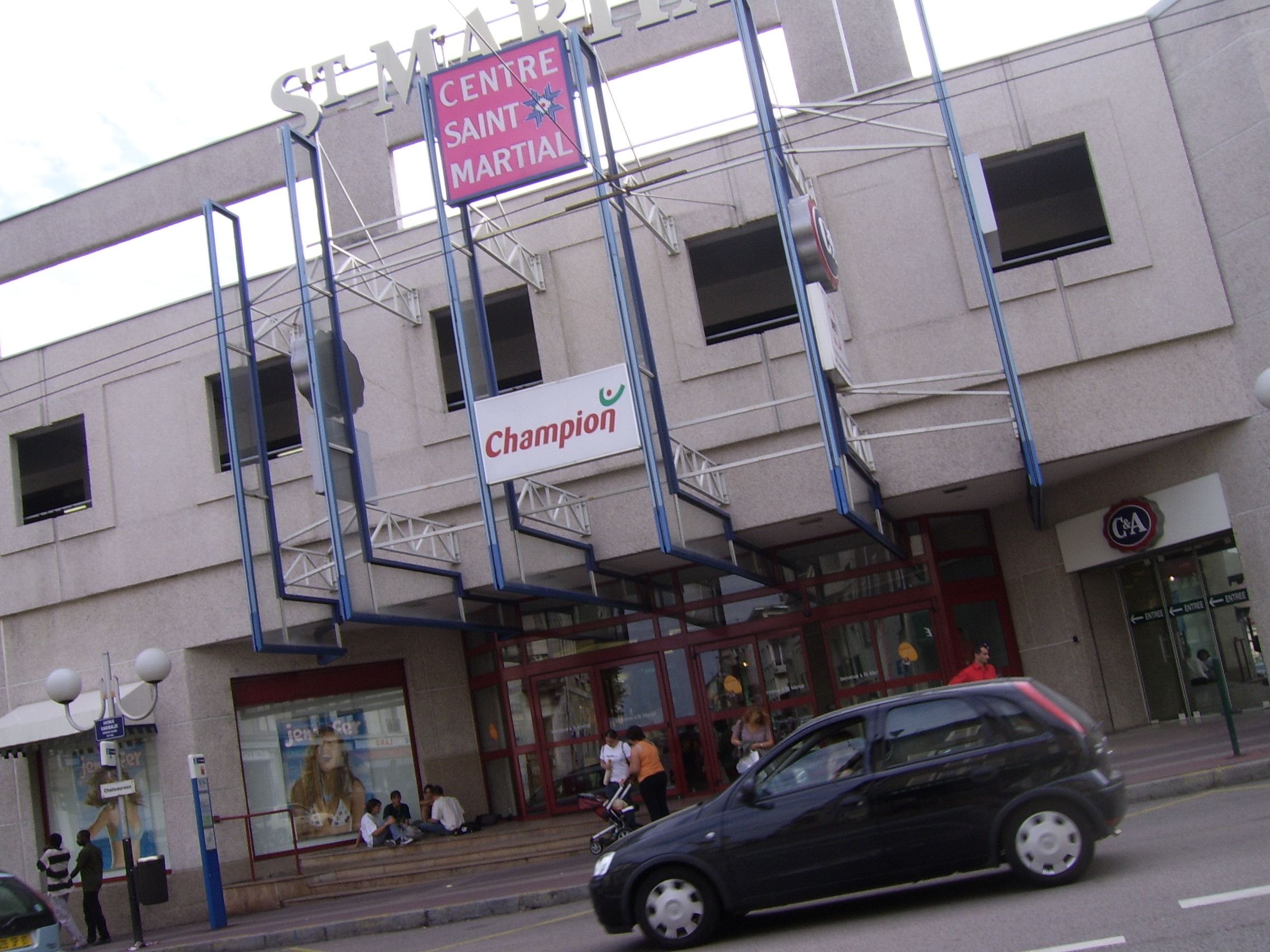 Centre commercial St-Martial de Limoges